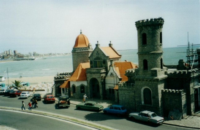 Torreon del Monje, Mar del Plata